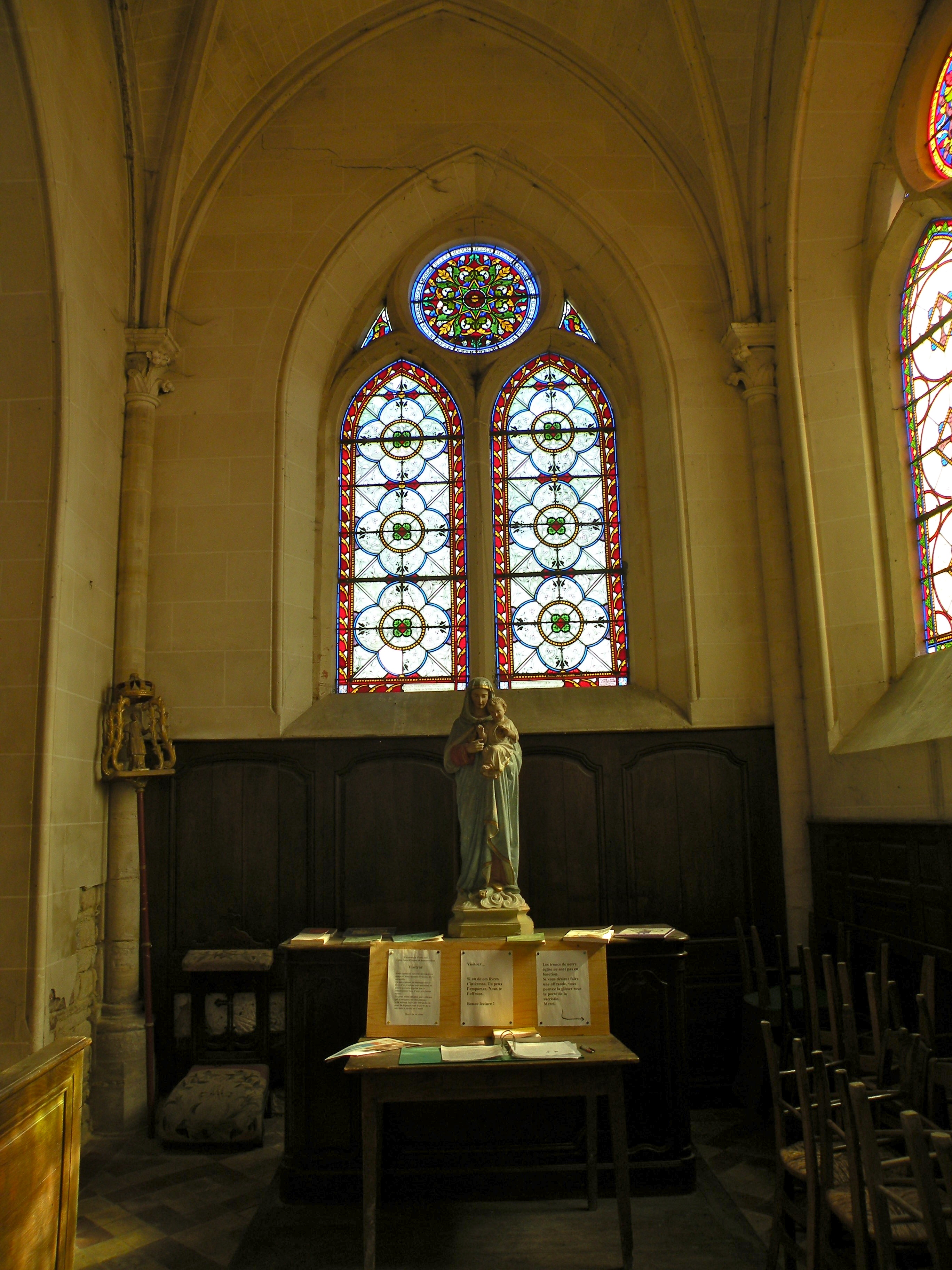 Église Saint-Étienne Bouconvillers : chapelle latérale au sud du chœur, bâtie comme chapelle seigneuriale à la fin du XIVe ou au début du XVe siècle, et dédiée à « Notre-Dame des Neiges ».